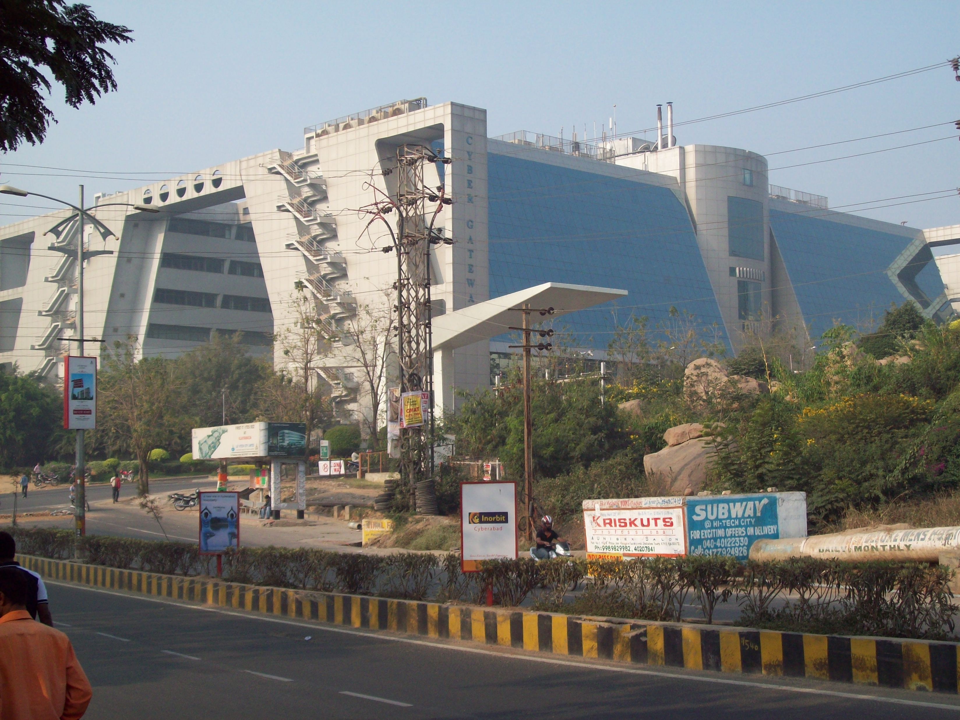 Cyber Gateway at Madhapur, Hyderabad